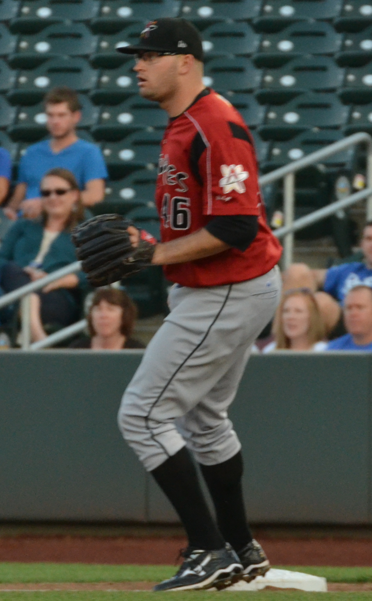 Stephen Fife